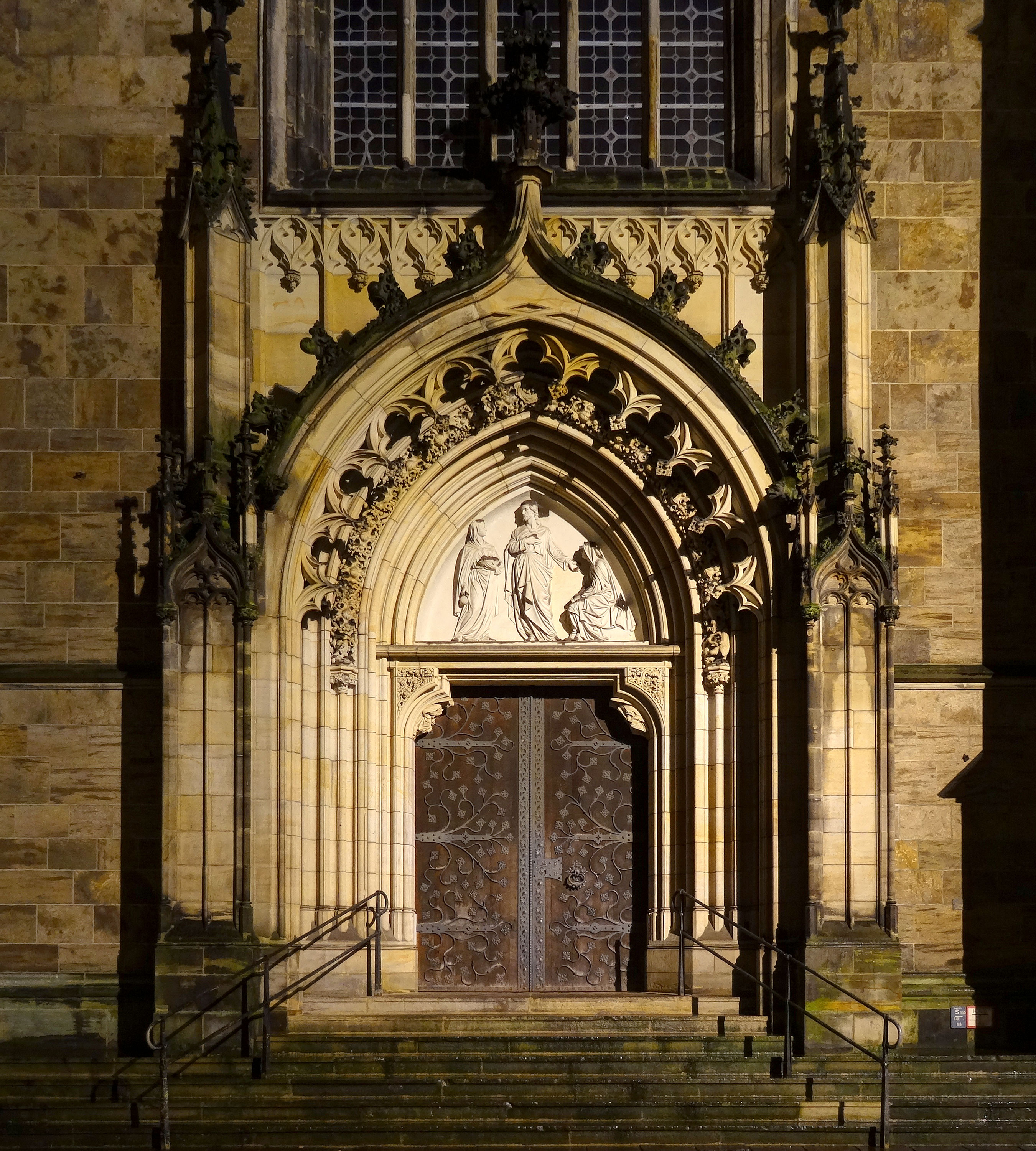 Brautportal am Bremer Dom (Nordseite)